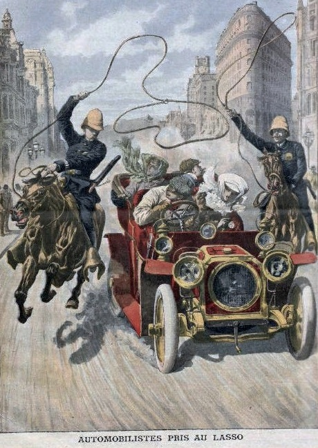 Automobiliste pris au lasso par la police de San Francisco en 1908 - Supplément Illustré du Petit Journal, 19 juillet 1908